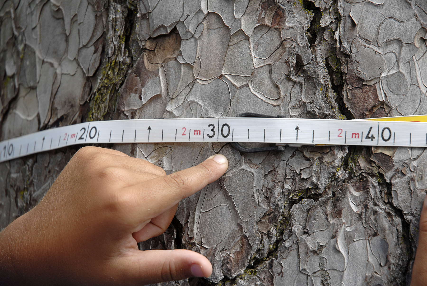 Mesurant la corda de la Pinassa Pinus nigra de Sant Llogari, d'aproximadament 2,30 metres.